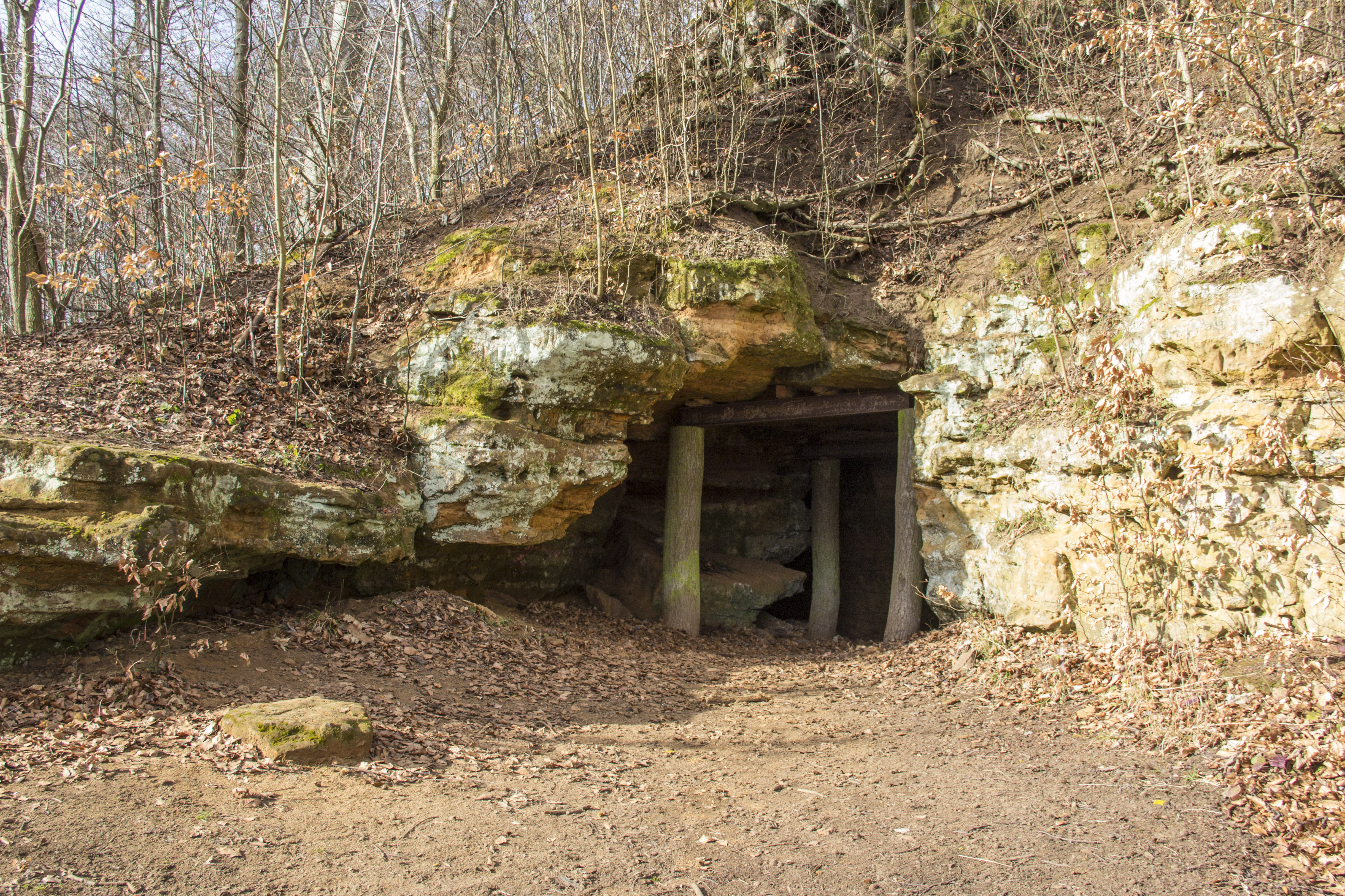 Sulzbürg, Pandurenloch, Höhle